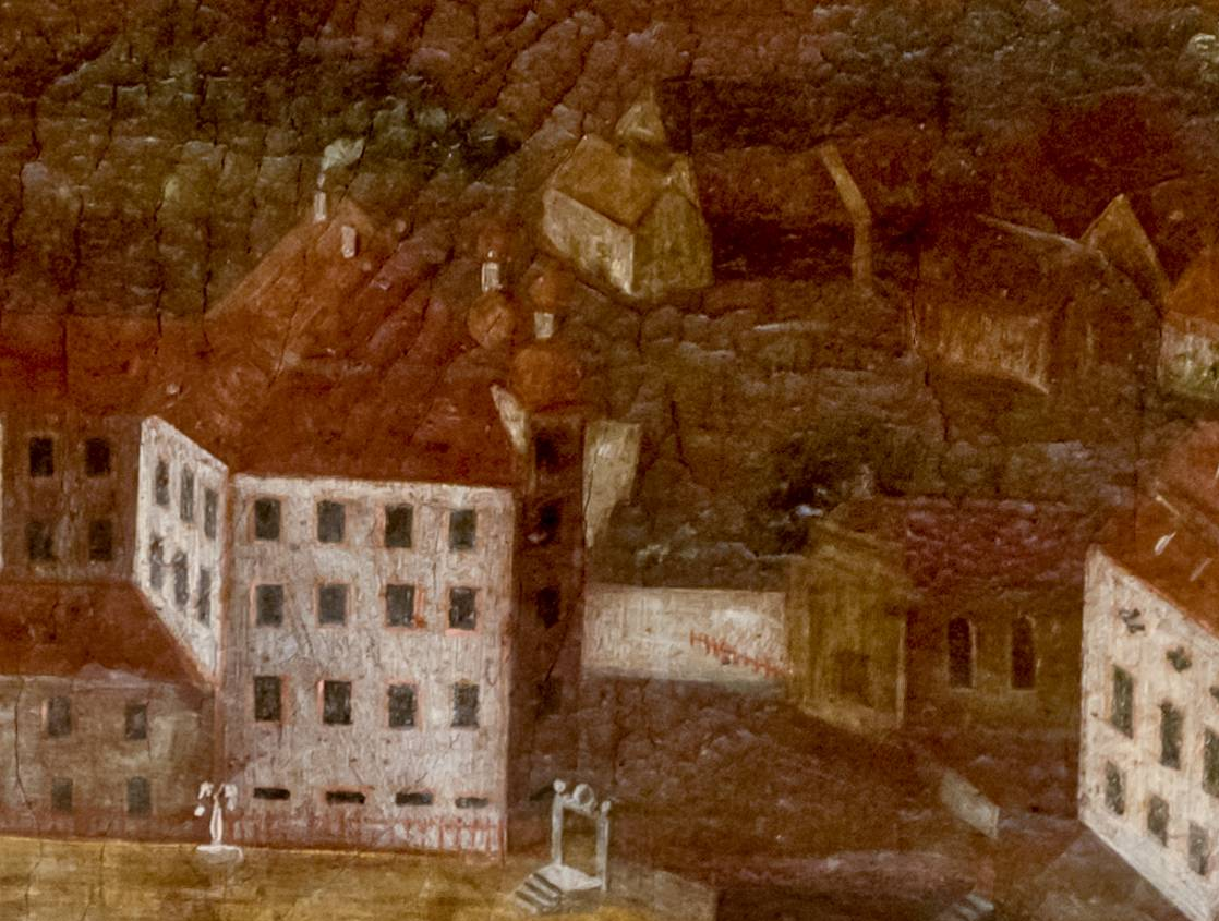 Bilder aus dem Schloß Bürgeln Hier Bilder von den Supraporten im ersten Stock des Schloßes. Es sind Bilder der Probsteien des Kloster St. Blasien und einige Füllbilder in einem später erstellten Flügel Bonndorf 1660 ARX ET PAGVS BONDORF QVEMVNACVMCOMITATV COGNOMINE ABBAS MARTINVS I. D. BLASIO ACQVISIVIT M.D.C.I.X